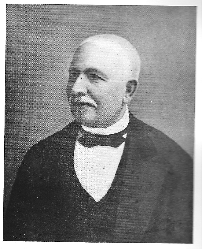 Agustin Pascual